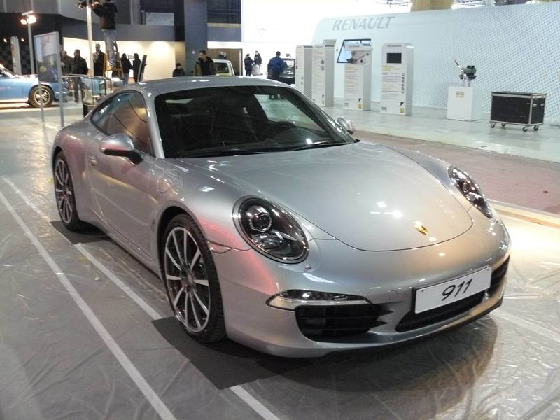 Français cadien: Retromobile 2012